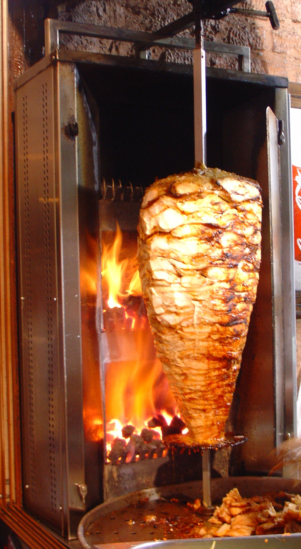 Doner kebap made at Istanbul